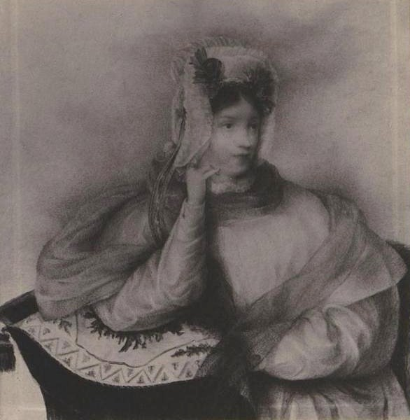 Княгиня Прасковья Николаевнf Голицына, ур. Матюнина (1798—1881).